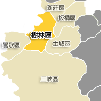 樹林區相對位置。